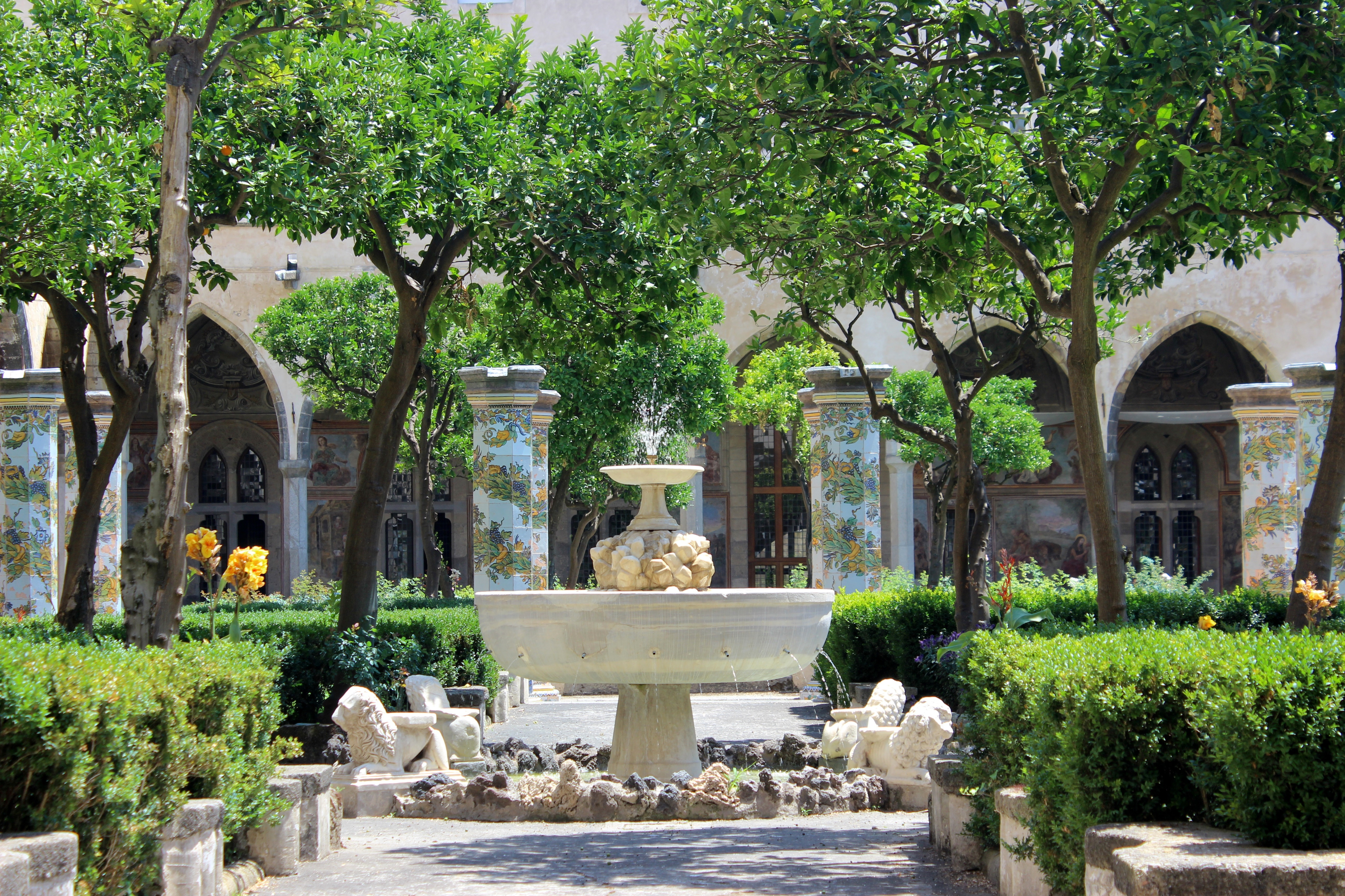 Nápoles. Santa Chiara. Claustro.